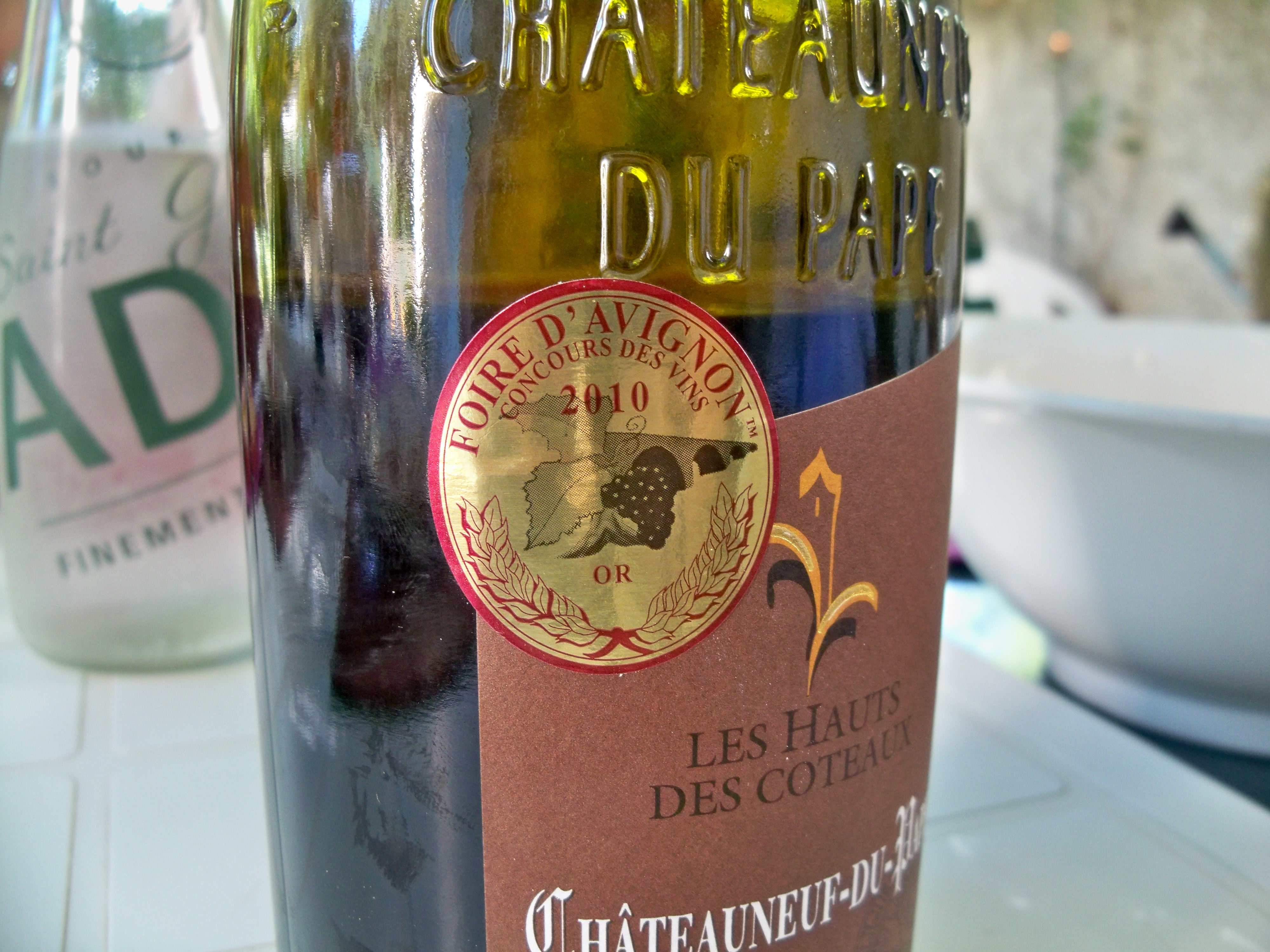 Médaille d'or du concours des vins de la foire d'Avignon